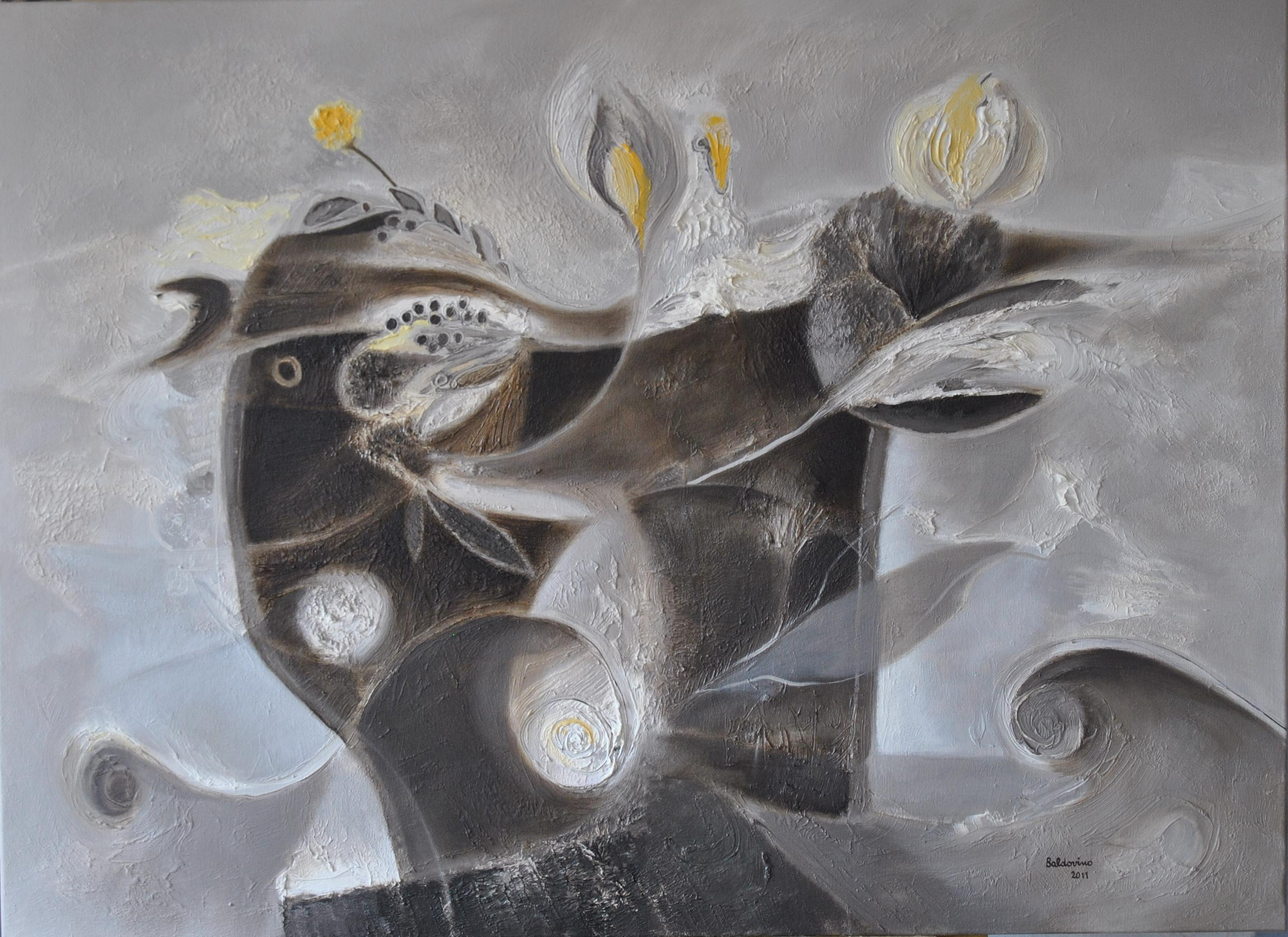 Ángel baldovino.El puente a la imaginación.Óleo sobre tela.100x73